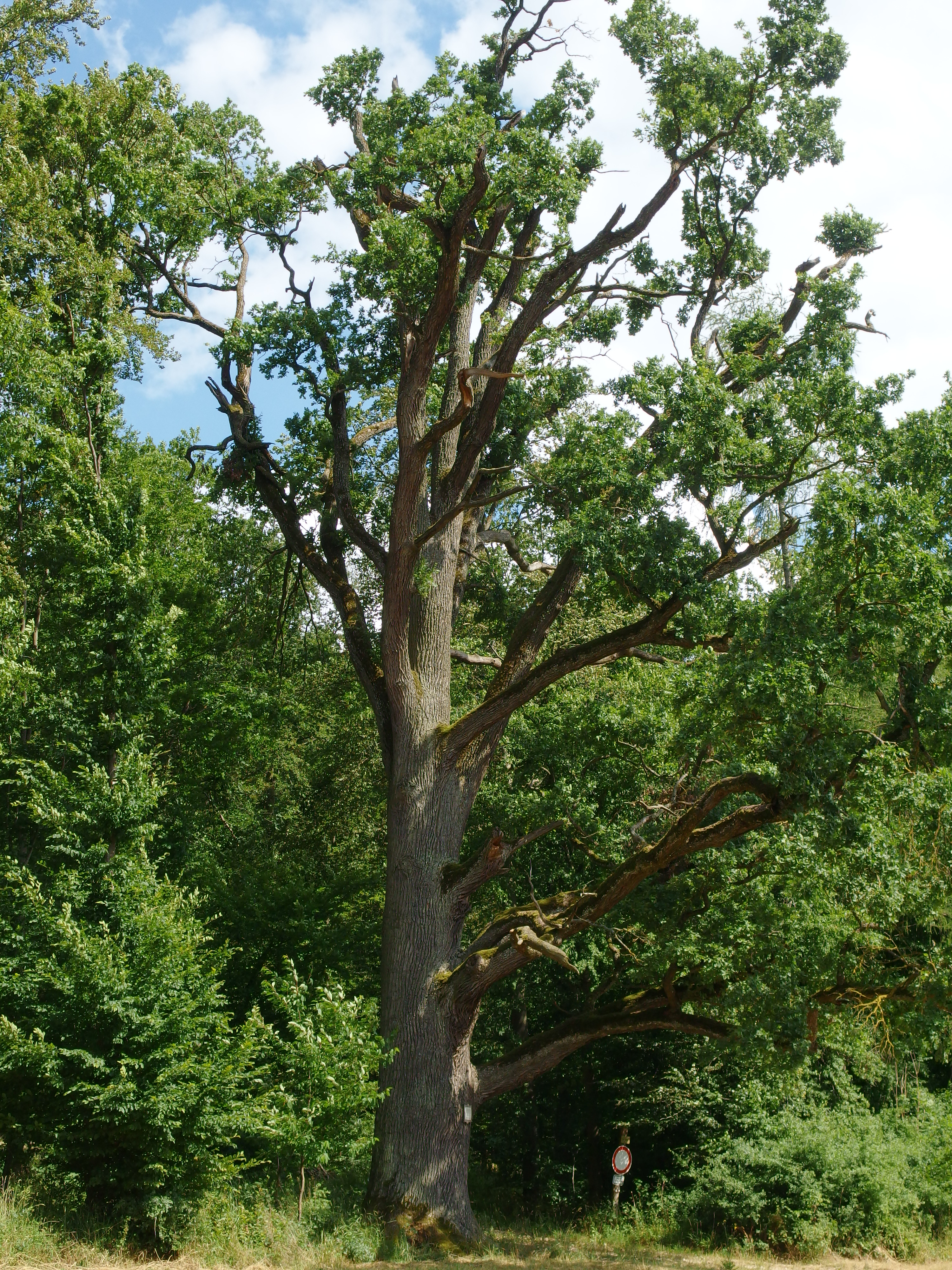 „Zigeunereiche“ in Buggenhofen, Markt Bissingen, Bayern; kartiertes Naturdenkmal; ca. 600 Jahre alt; zum Größenvergleich siehe das Verkehrsschild rechts des Baumes